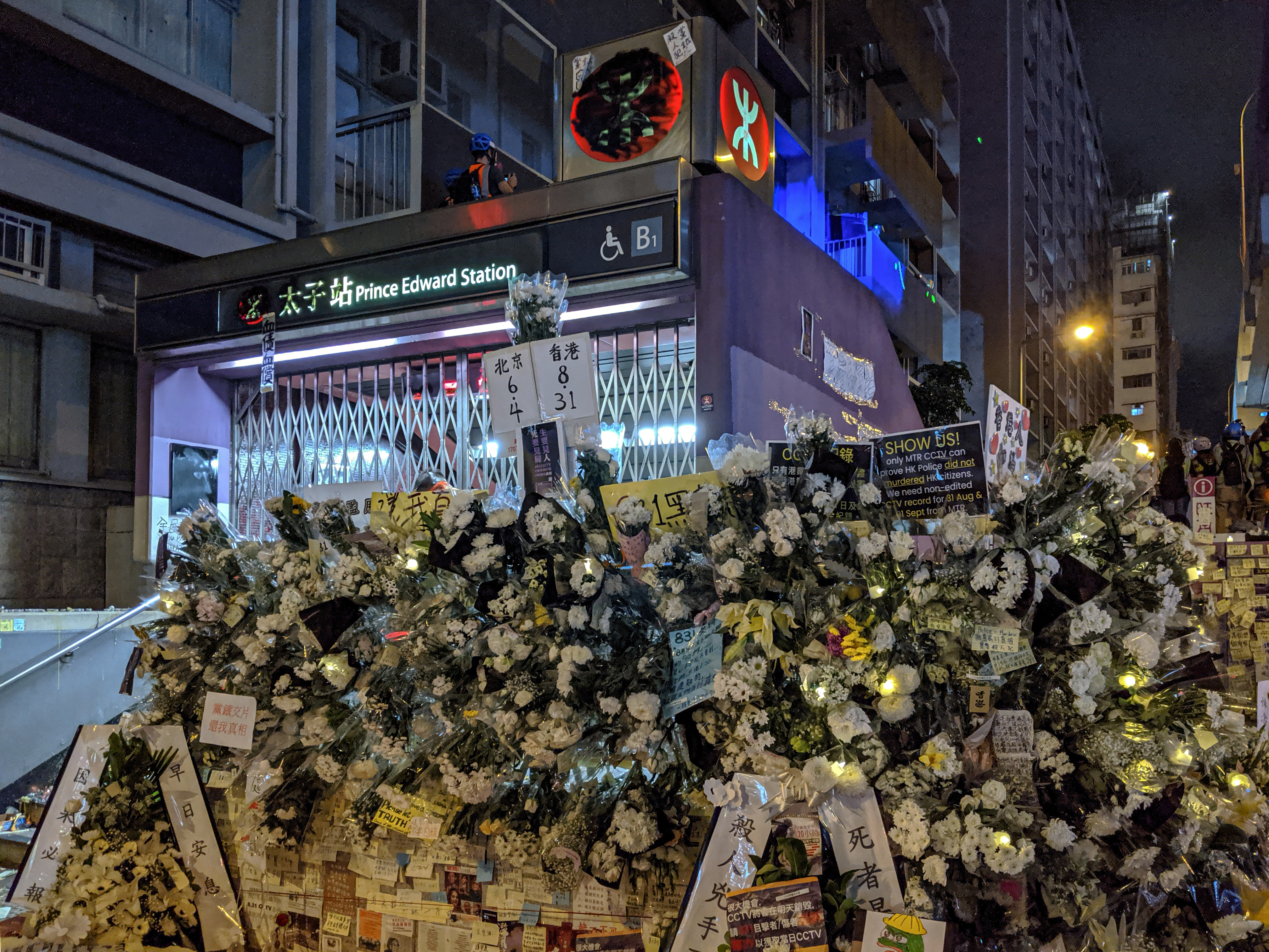 20190906 Prince Edward MTR